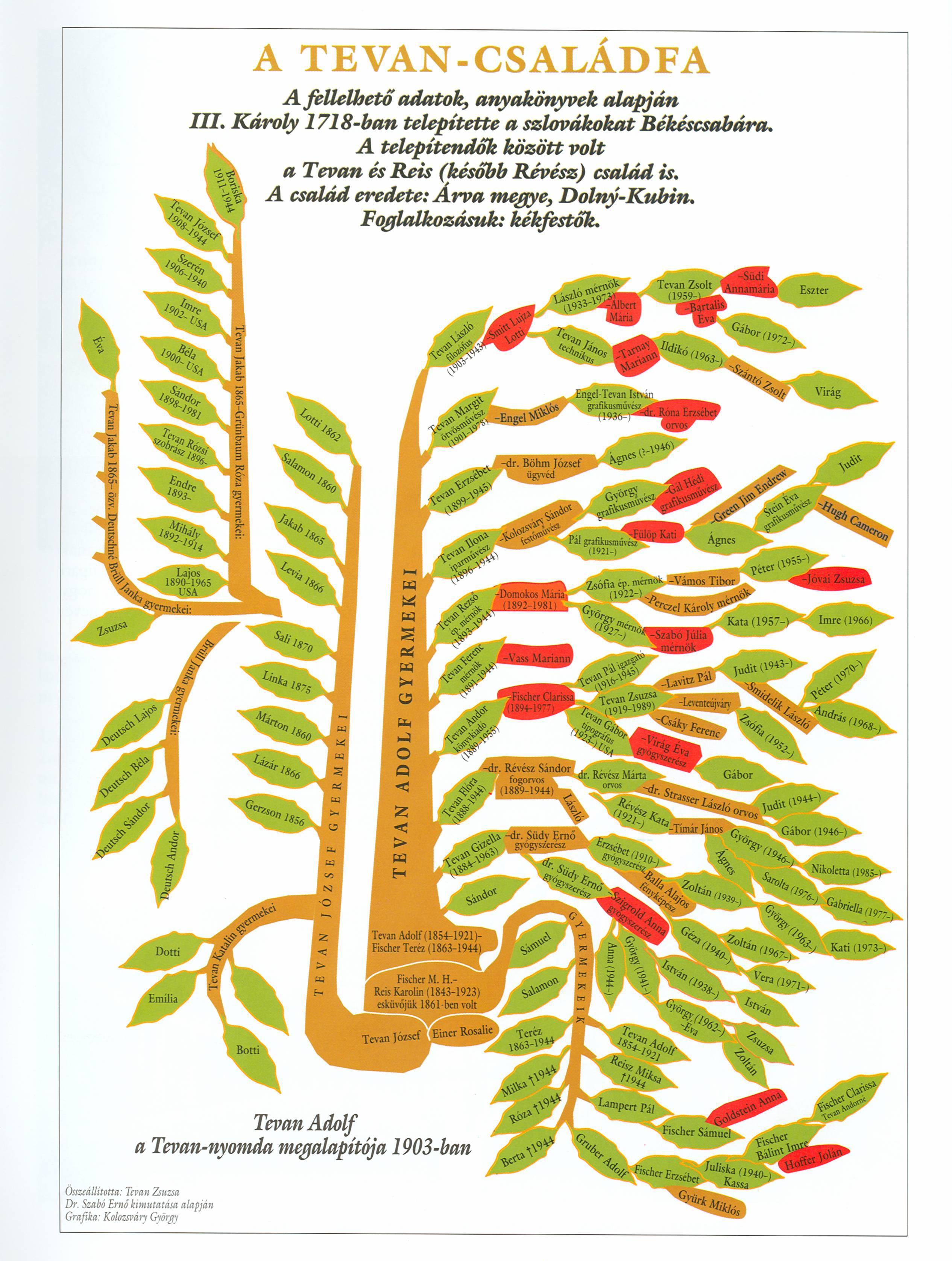 Tevan Adolf és családfája Ez a családfa eredetileg a Tevan Andor születésének centenáriuma alkalmából a békéscsabai Munkácsy Mihály Múzeumban rendezett emlékkiállítás számára készült 1989-ben.